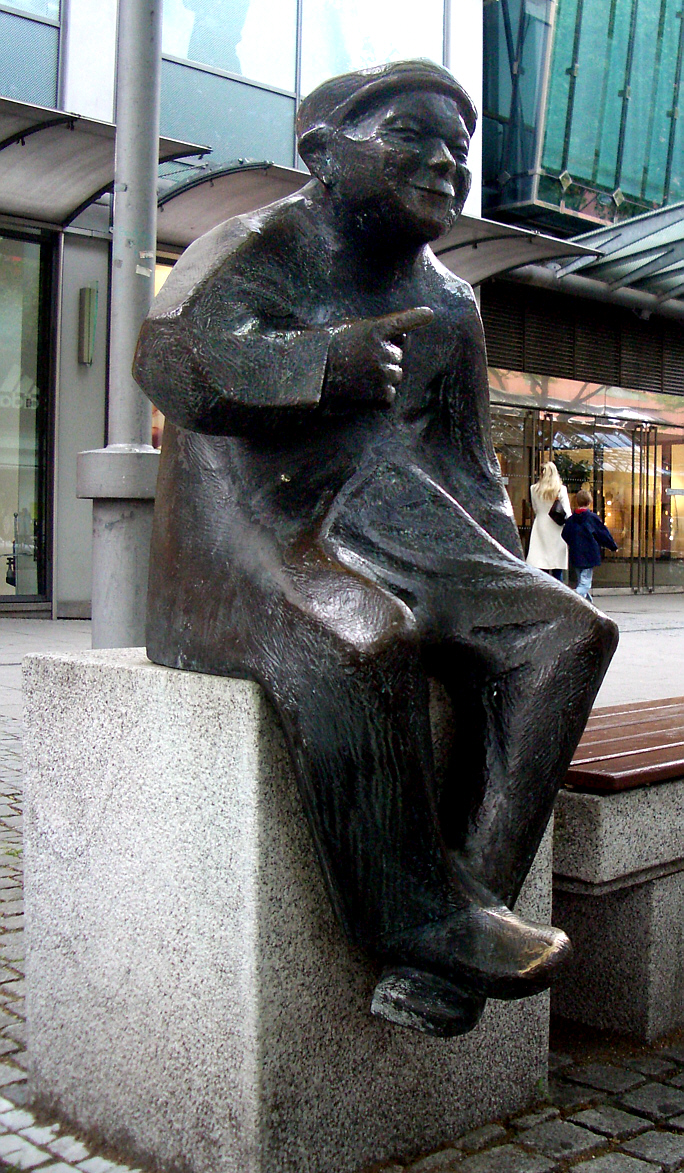 Mannheim, Germany: Blumepeter Monument by Gerd Dehof (1967), Kapuzinerplanken